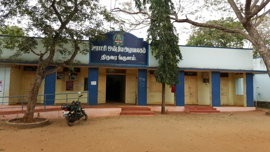 திருவரங்குளம் ஊராட்சி ஒன்றிய அலுவலகம்